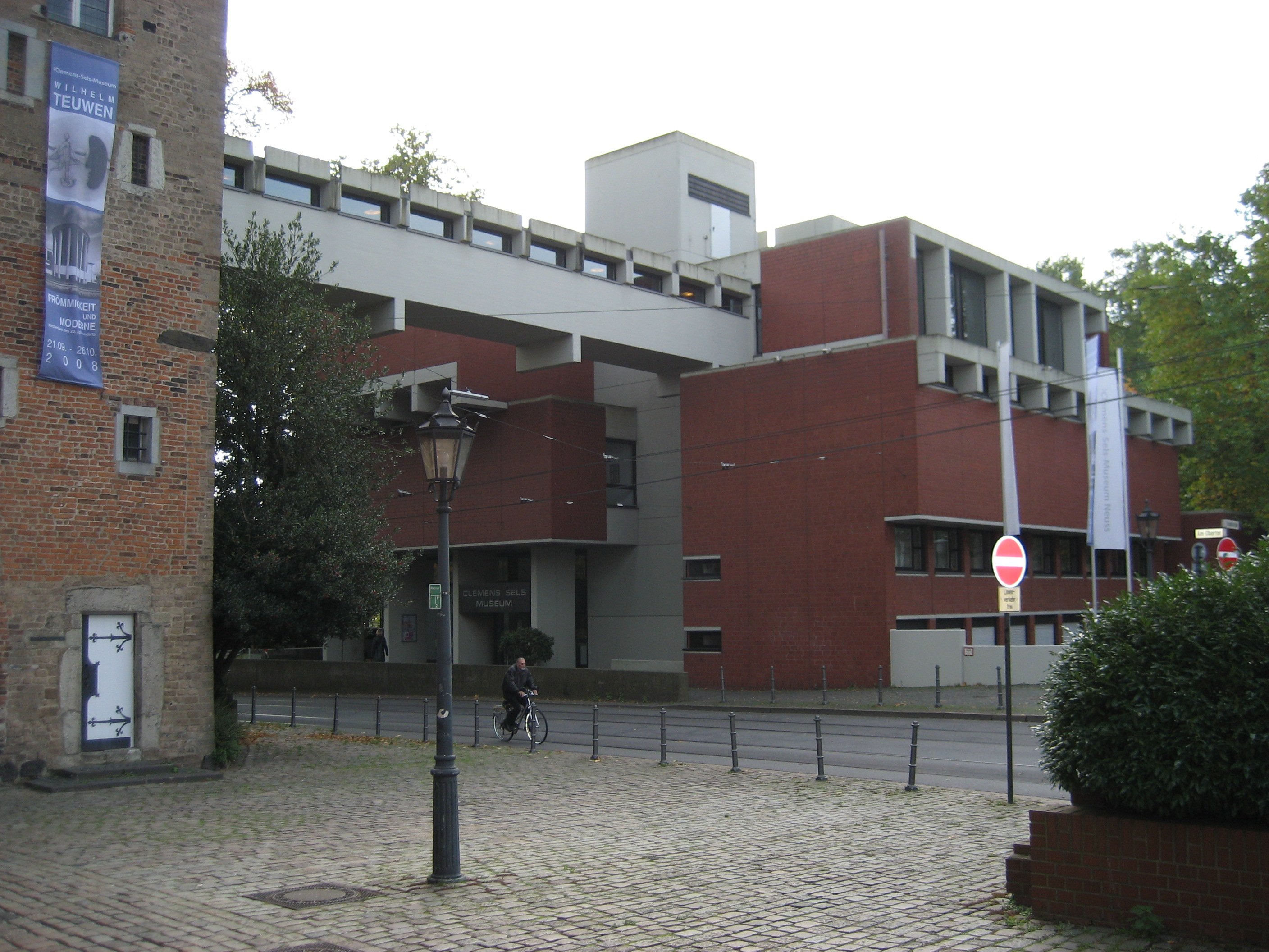 Das Clemens-Sels-Museum in Neuss.